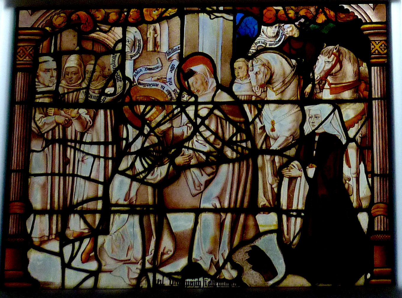 Bleiglasfenster im Museum Schnütgen in Köln (siehe Dagmar Täube: Rheinische Glasmalerei. Meisterwerke der Renaissance, Bd. II Katalog, Schnell und Steiner, Regensburg 2007, ISBN 978-3-7954-1944-8)